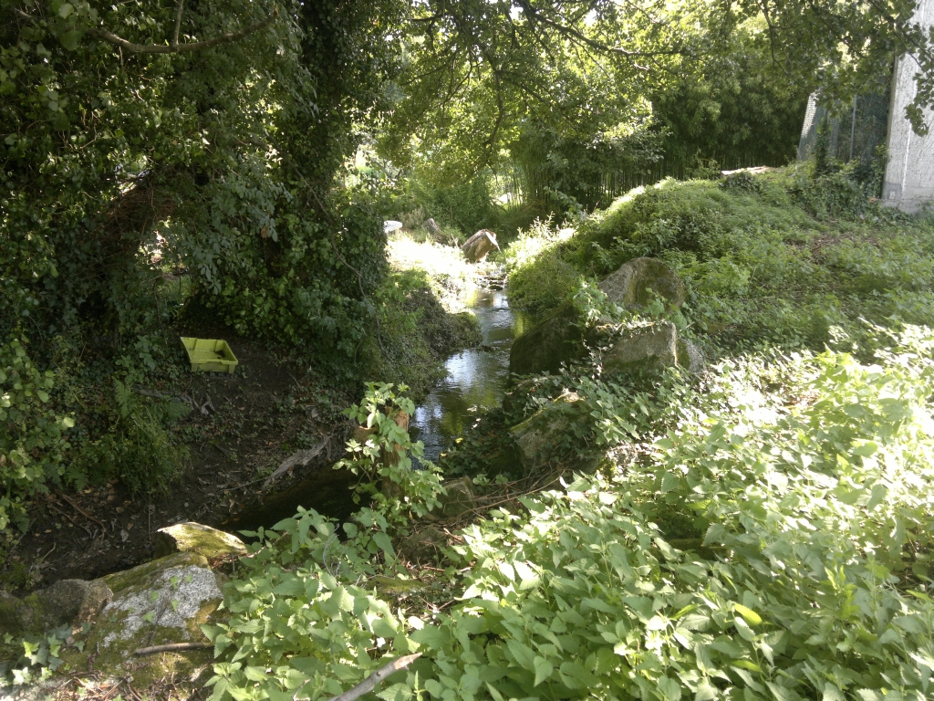 Río Mesoiro, A Coruña (Galiza).